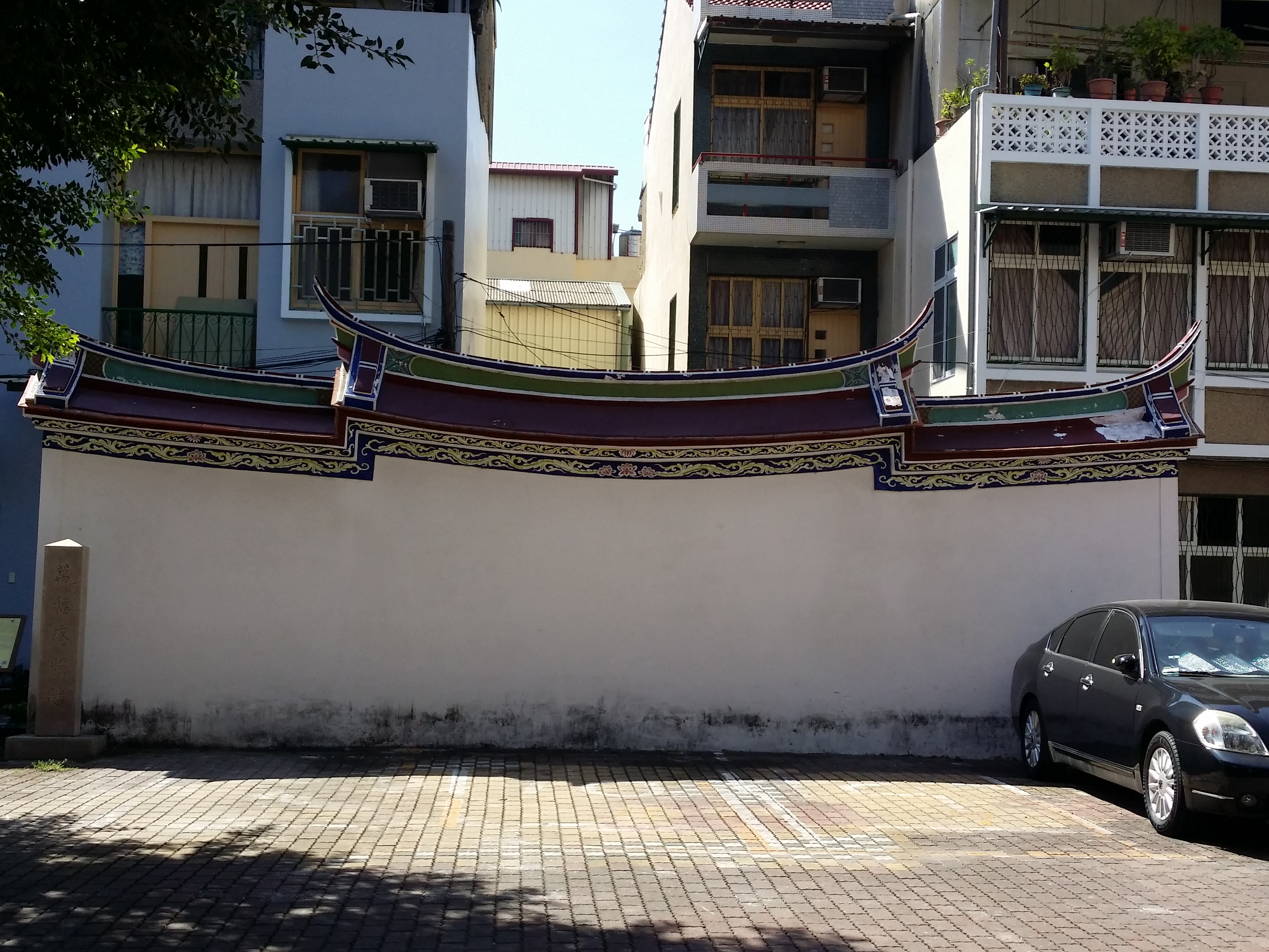 中文（台灣）: 萬福庵照牆 照牆又稱照壁，為主建築入口之屏障，具隱蔽與遮擋作用。萬福庵照牆為二重脊，燕尾舒暢微揚，內以紅磚為材料，外飾白灰，近年曾做整修而成今貌。